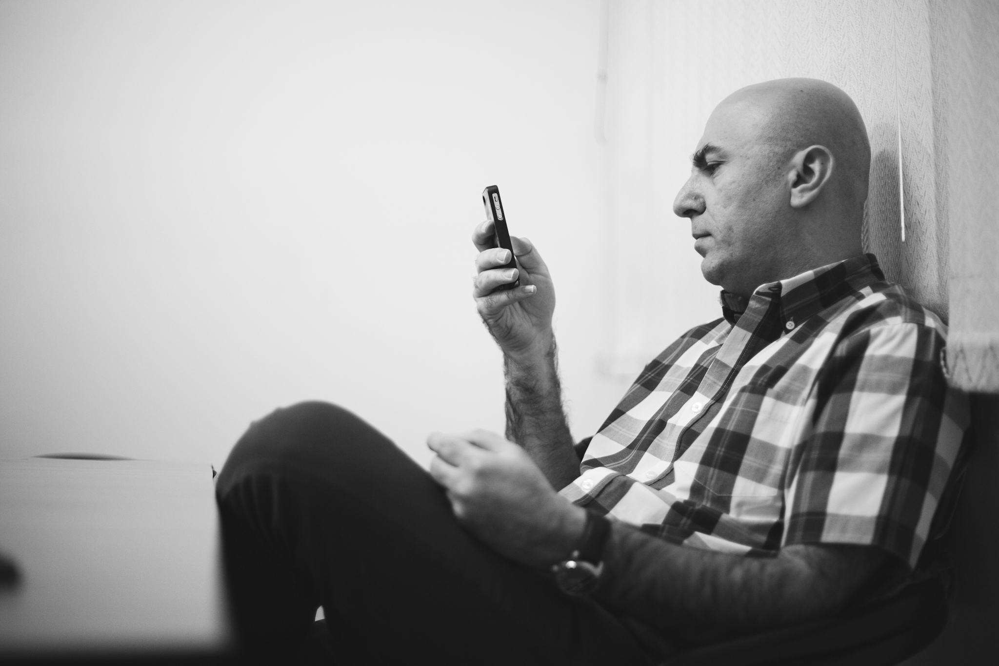 این عکس توسط پوریا افخمی در شهر تهران ثبت شده است